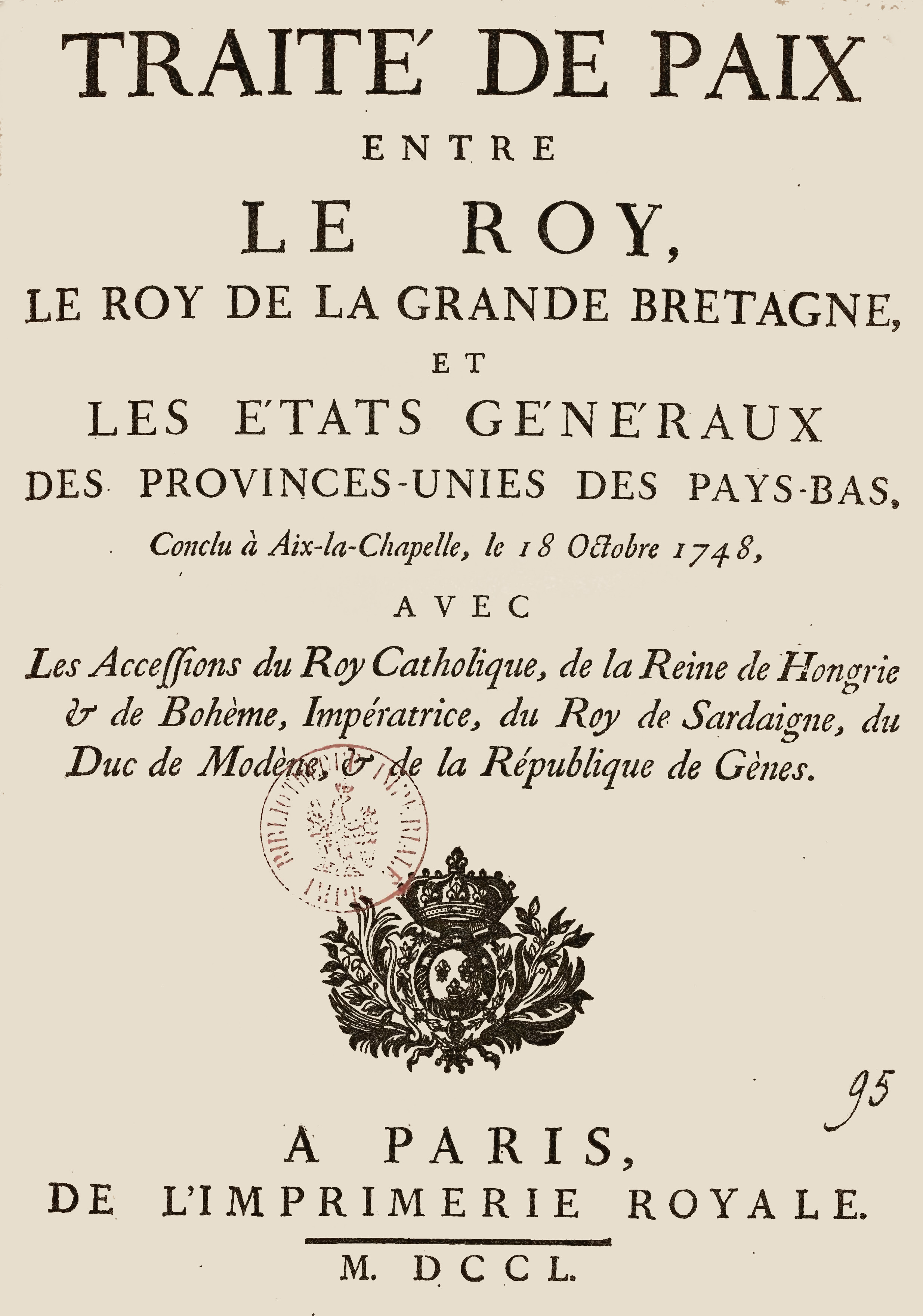 Page de titre de "Traité de paix entre le Roi, le Roi de la Grande Bretagne, et les Etats genéraux des Provinces-unies des Pays-Bas, conclu à Aix-la-Chapelle le 18 octobre 1748 ; avec les accessions du Roi Catholique de la Reine de Hongrie et de Bohême, impératrice, du Roi de Sardaigne, du Duc de Modène et de la République de Gênes", Paris, Imprimerie nationale, 1750